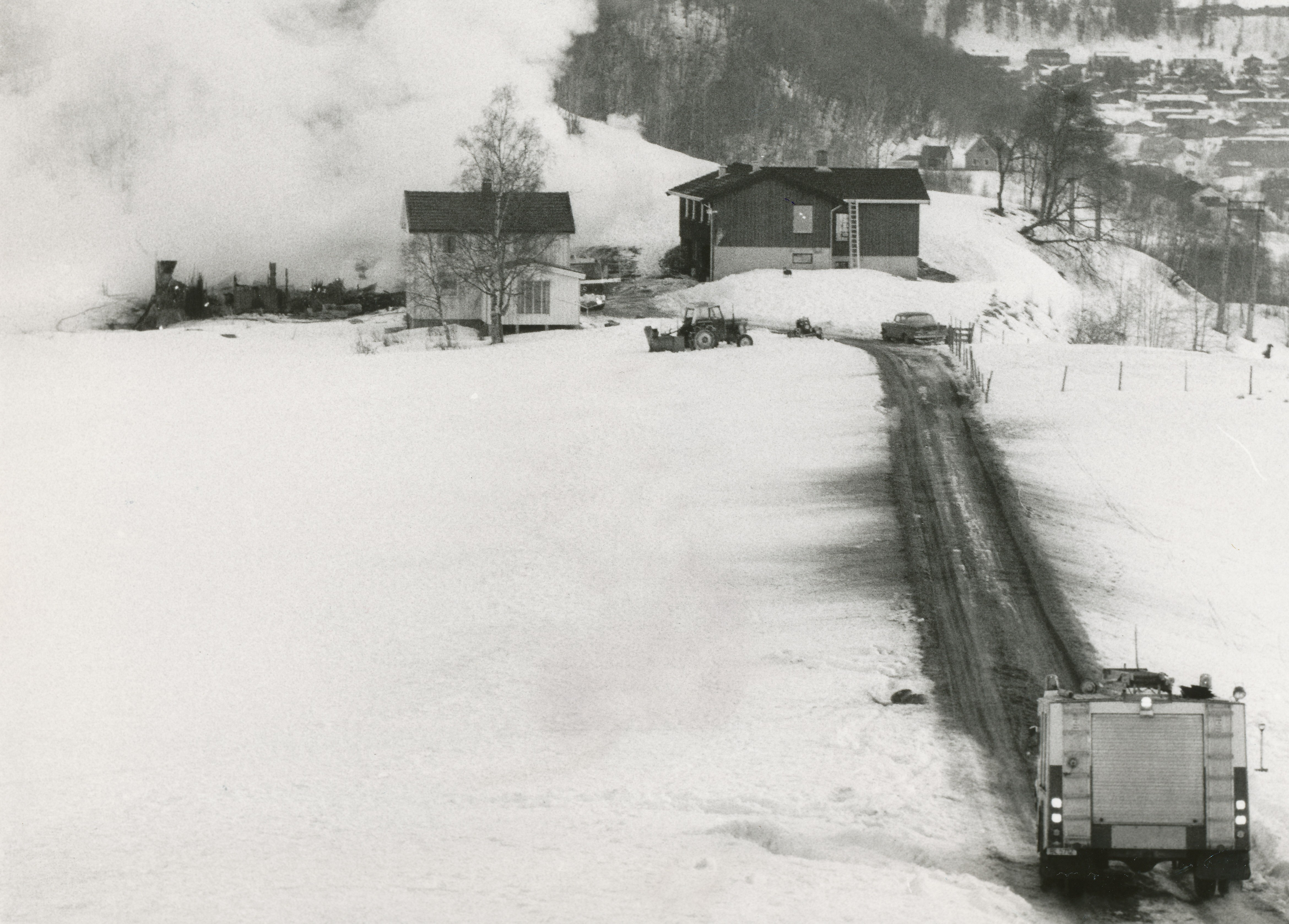 Brann på Nidarvoll den 21. mars 1983. Ukjent fotograf. Fra Trondheim Brannvesens arkiv.